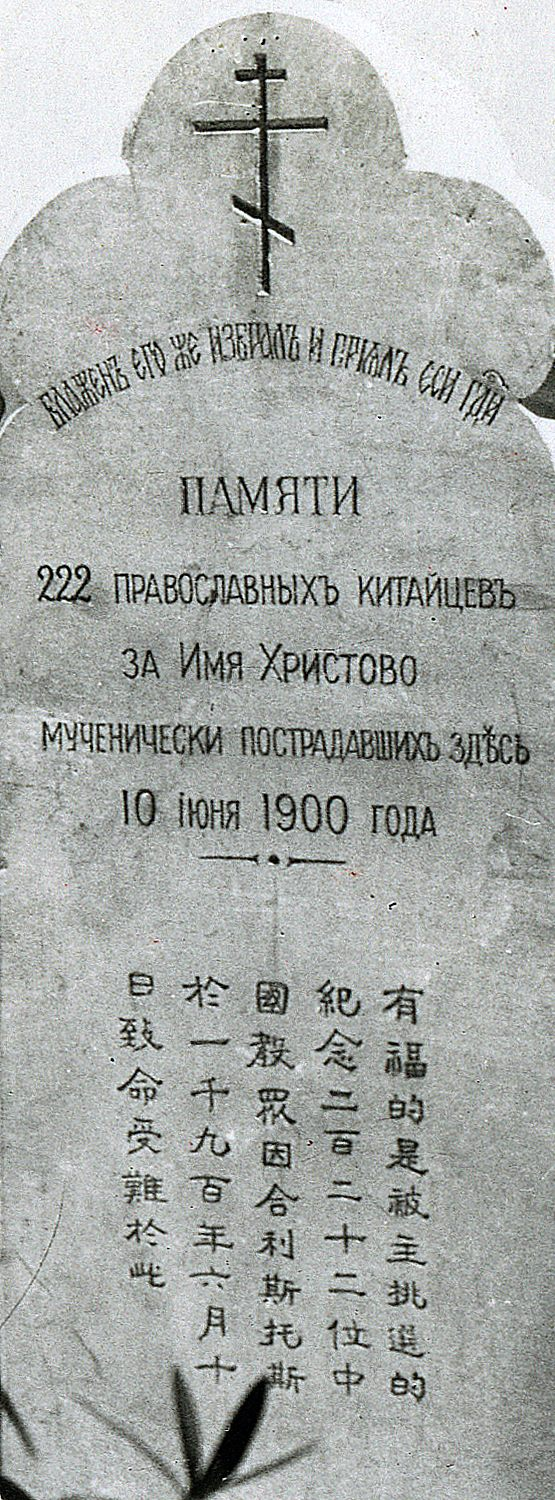 Памятник над колодцем, в который боксерами были брошены тела убитых православных китайцев.